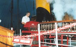 het stoomorgel aan boord van het stoomschip Succes anno 1897